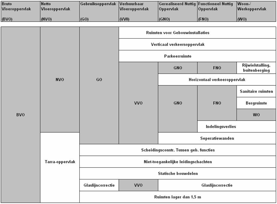 Eigen maak.